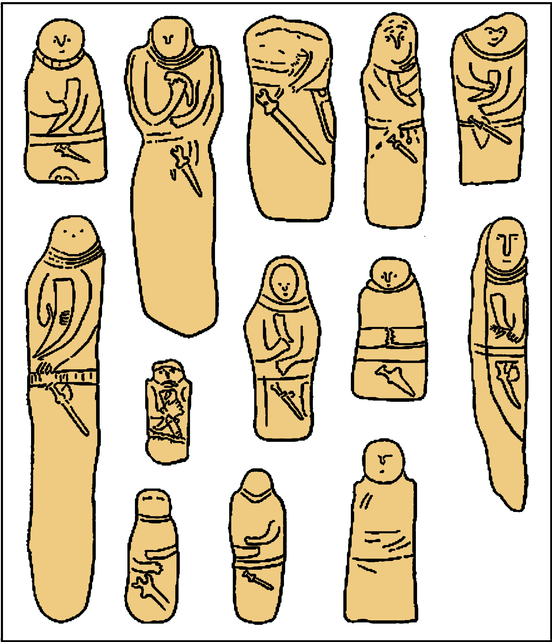 Scythian stelae, images redrawn from Б. А. Рыбаков, Язычество древней Руси (1987, fig. 7), original caption: Рис. 7. "Скифские" (сколотские?) идолы VI–V вв. до н. э. 1—Станишино; 2—Медерово; 3—Первомайск; 4—Эрделевка; 5—Днепропетровск; 6—Киев; 7—Терновка; 8—Калиновка; 9—Грушевка; 10—Ясиноватое; 11—Ступино; 12—Сибиоара; 13—Добруджа The stelae are numbered from top left to bottom right: 1. Stanshino (?Russia), 2. Mederovo (Kirovohrad Oblast, Ukraine), 3. Pervomaysk (?Ukraine), 4. Erdelevka (?Ukraine), 5. Dnipropetrovsk (Ukraine), 6. Kiev (Ukraine), 7. Ternovka (?Ternivka, Dnipropetrovsk Oblast, Ukraine), 8. Kalinovka (?Kalinivka, Ukraine), 9. Grushevka (?Dnipropetrovsk Oblast, Ukraine), 10. Yasinovatoye (Zaporozhsk or Kharkovsk oblast?, Ukraine), 11. Stupino (?Russia), 12. Sibioara (Constanța, Romania), 13. Dobruja (Bulgaria/Romania).